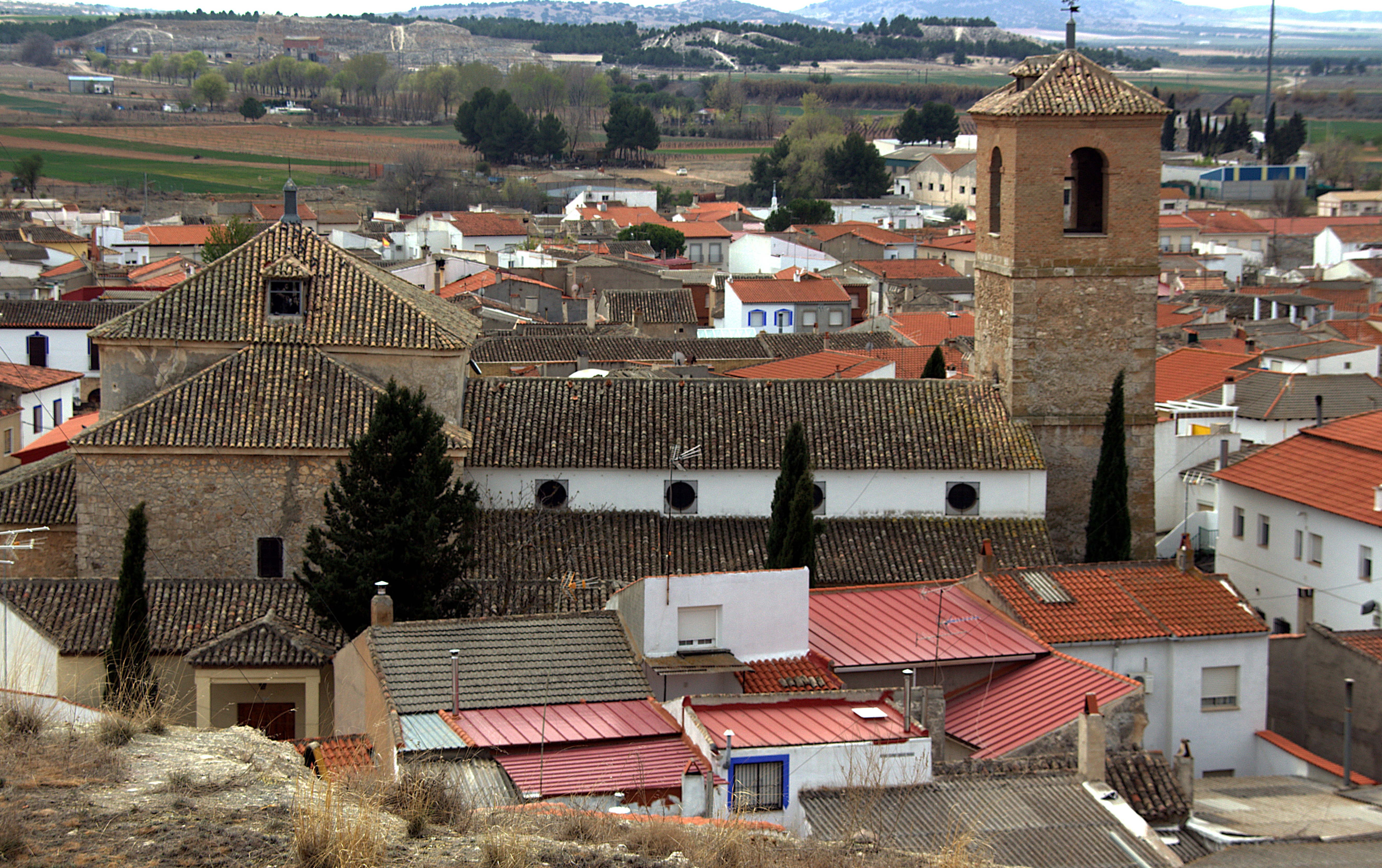 Iglesia de El Romeral (España).